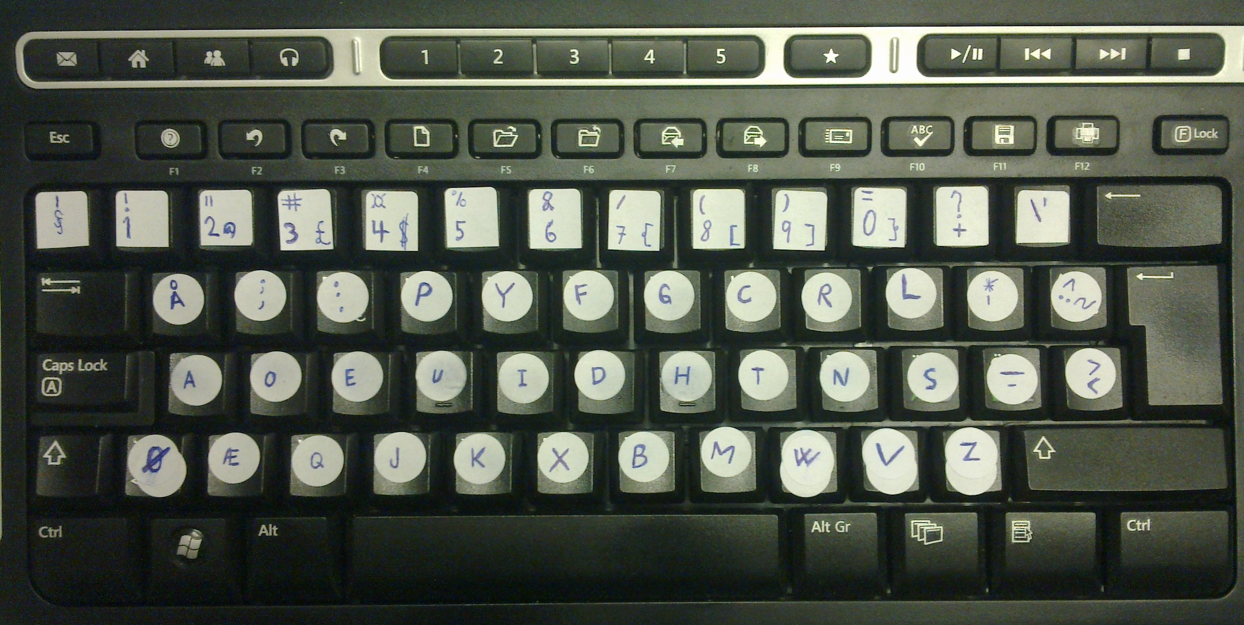 Et Dvorak-tastatur konvertert fra QWERTY-tastatur ved hjelp av klistremerker